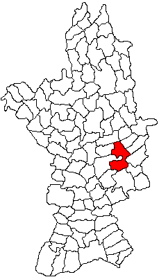 Categorie:Hărţi ale judeţului Olt